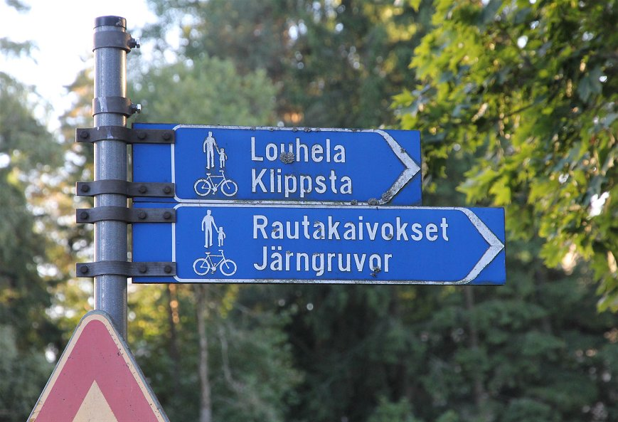 Opaste aiemman Kaivokselan (Silvolan eli alkujaan Sillbölen) rautakaivoksen jäänteille Vantaan Kaivokselassa, Kaivokselan koulun ja päiväkodin lähellä. Huom: Muista säilyttää viittaus kuvaajaan, mikäli käytät kuvaa.